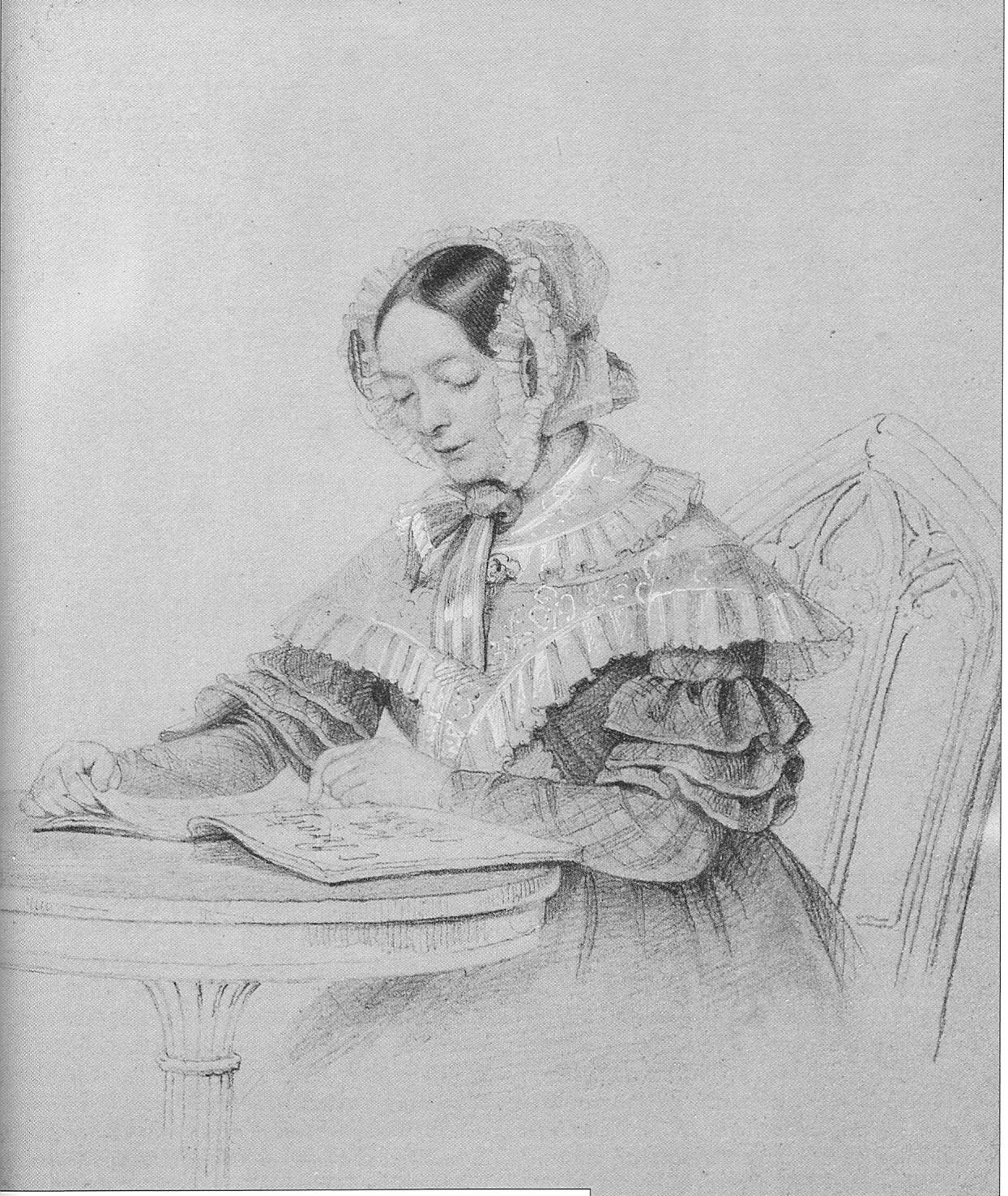 К. К. Пиратский. Бумага, карандаш, акварель. 1828 год.